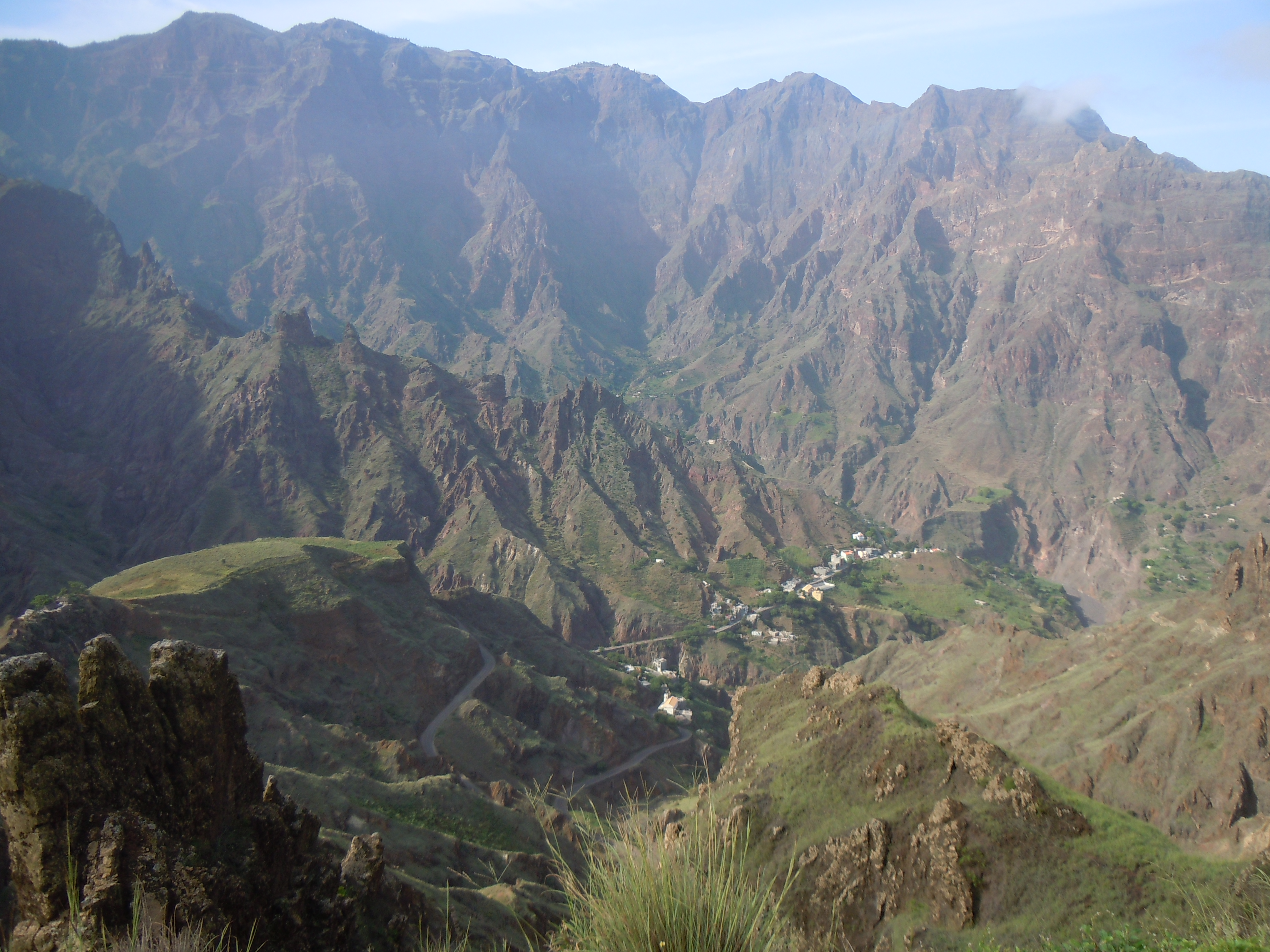 La vallée de Garça dans le nord de l'île de Santo Antao (Cap-Vert)